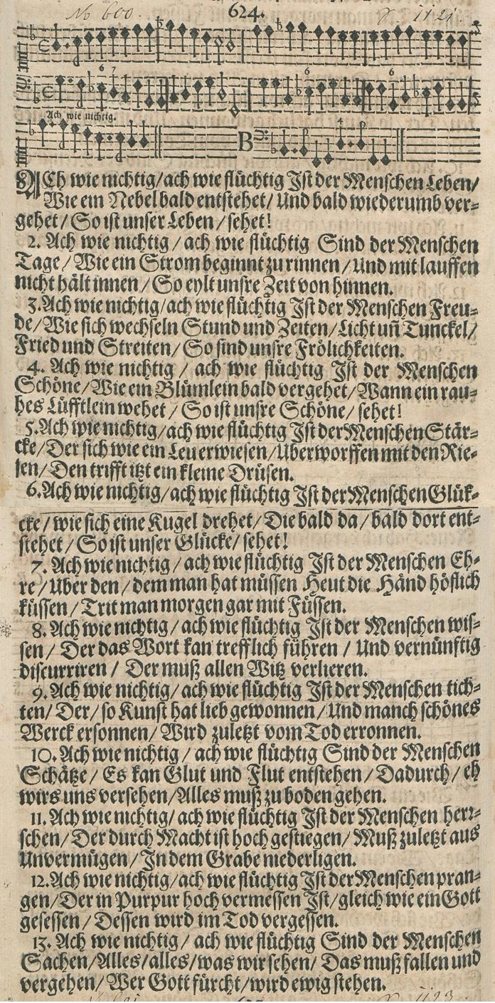 Ach wie nichtig, ach wie flüchtig in der Fassung der Praxis pietatis melica, Auflage von 1666